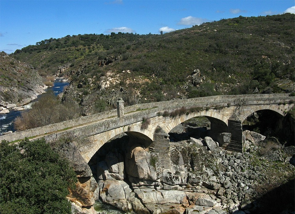 Esta ponte fica no concelho de Almeida e pode ser encontrada do lado norte da actual ponte rodoviária da estrada nacional entre Almeida e o cruzamento com a EN 324